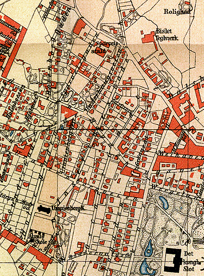 Kart over Homansbyen, 1887